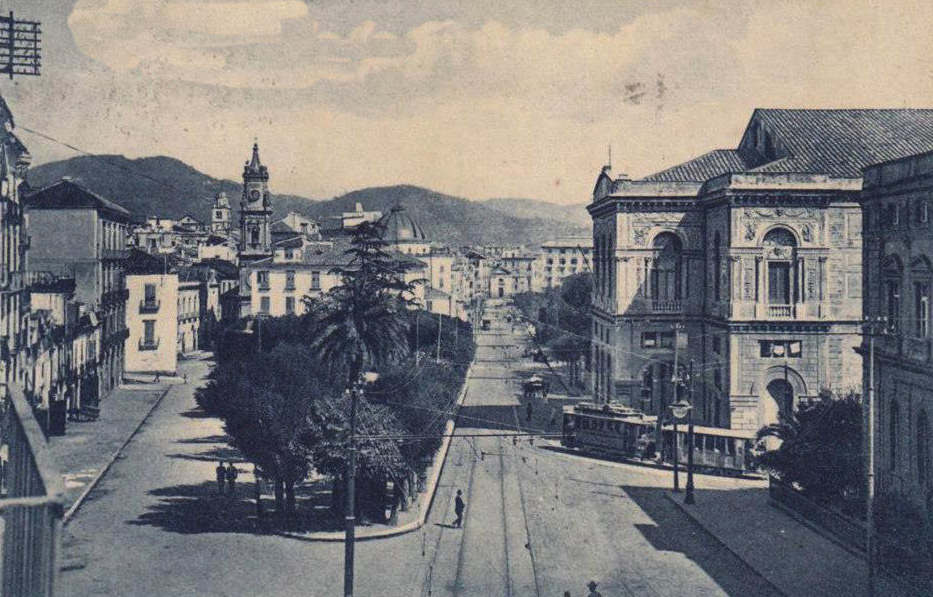 Una foto di inizio '800 del teatro Verdi e di via Roma